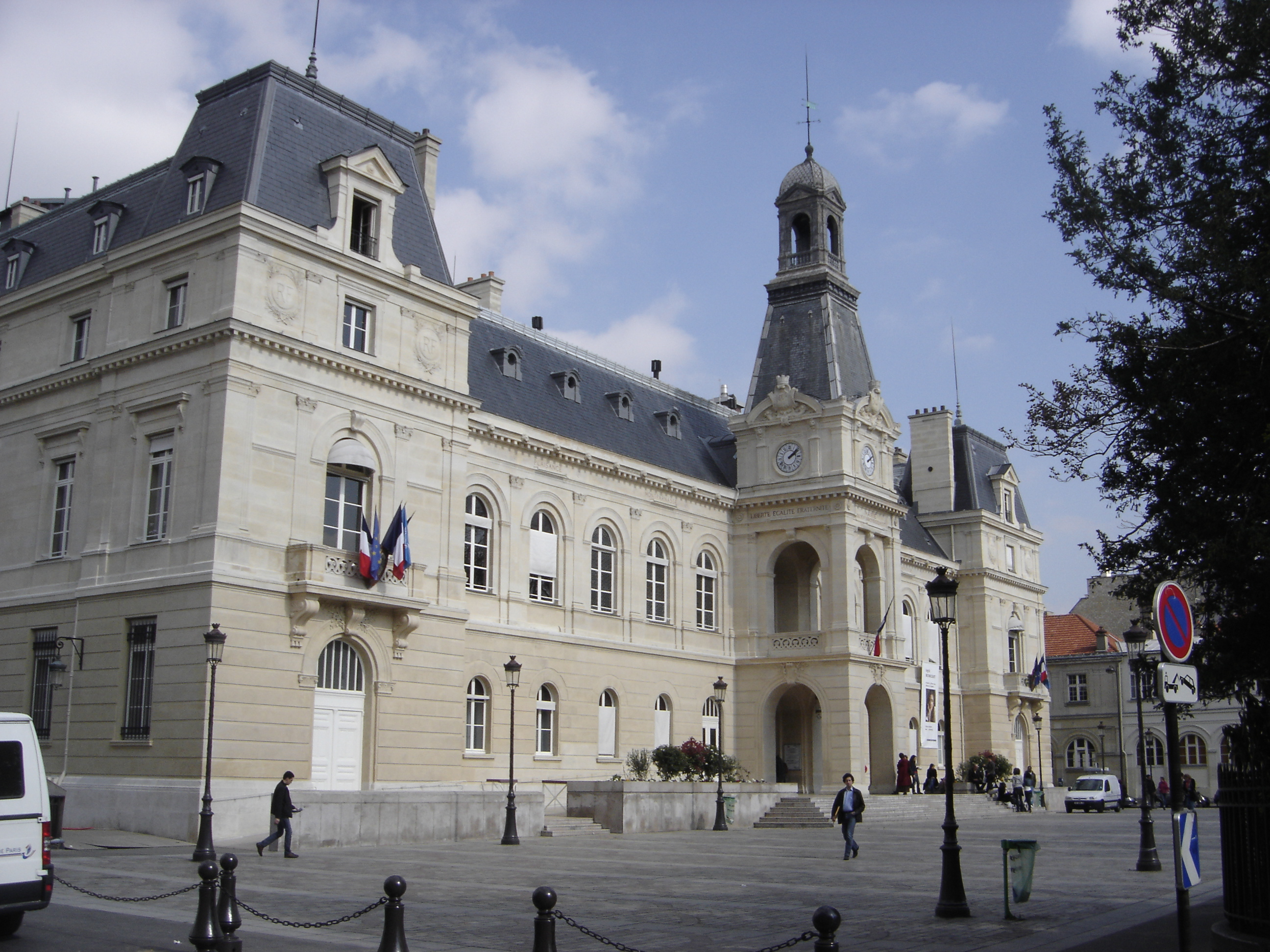 Mairie du 14ème arrondissement - Paris